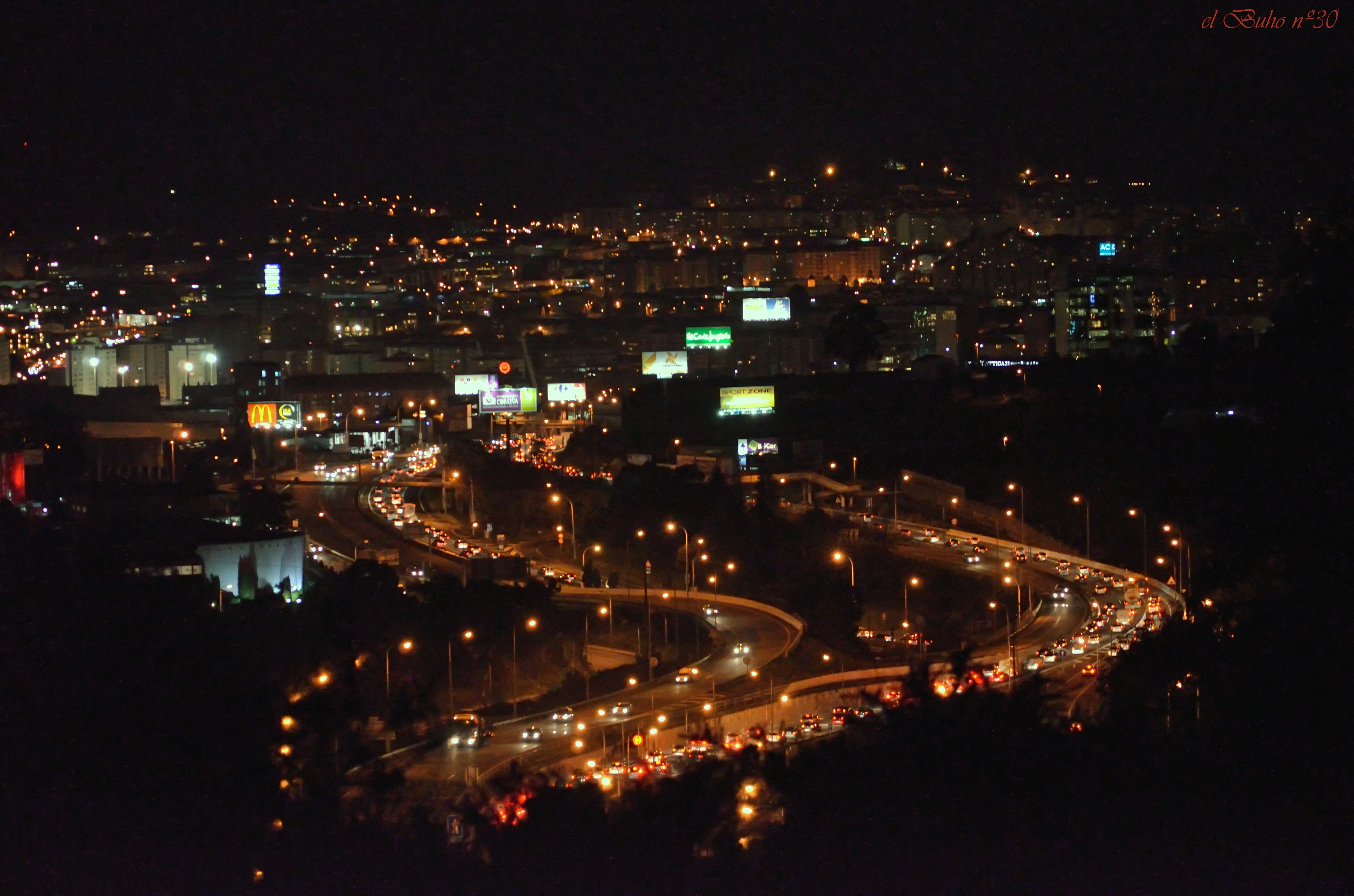 La Coruña (España) vista de noche.